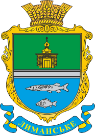 Герб села Лиманське (Ренійський район)